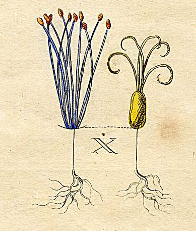 Ausschnitt (Klasse XXII) aus Ehrets Tafel "Methodus Plantarum Sexualis"